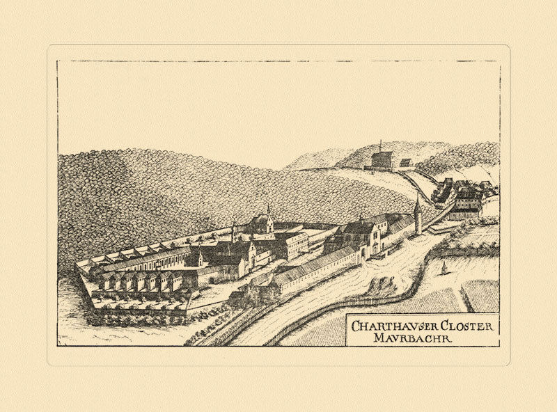 Chartreuse de Mauerbach par Georg Matthäus Vischer (1628-1696).